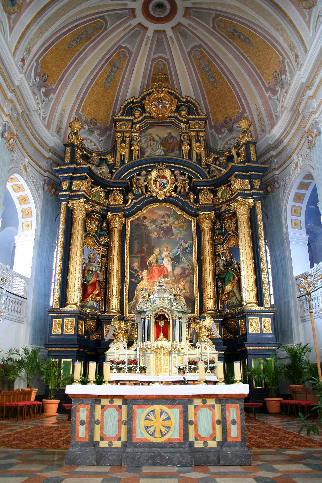 Der neubarocke Hochaltar im Chor der Basilica minor St. Anna im Wallfahrtsort Altötting (Landkreis Altötting, Oberbayern).